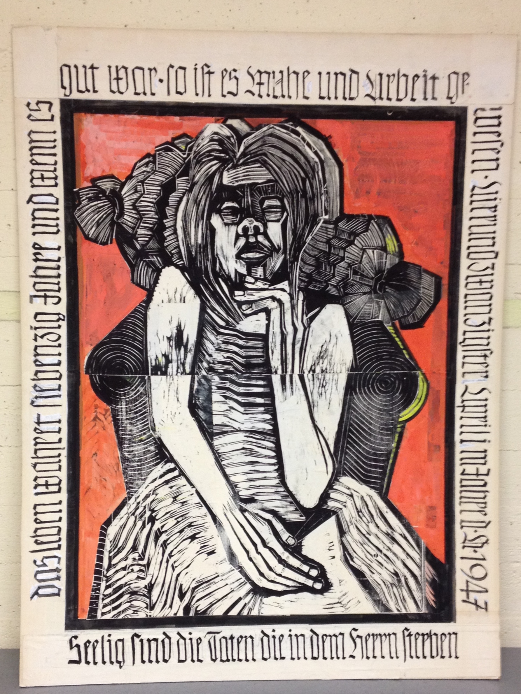 Frau sitzend, umlaufender kalligrafischer Text